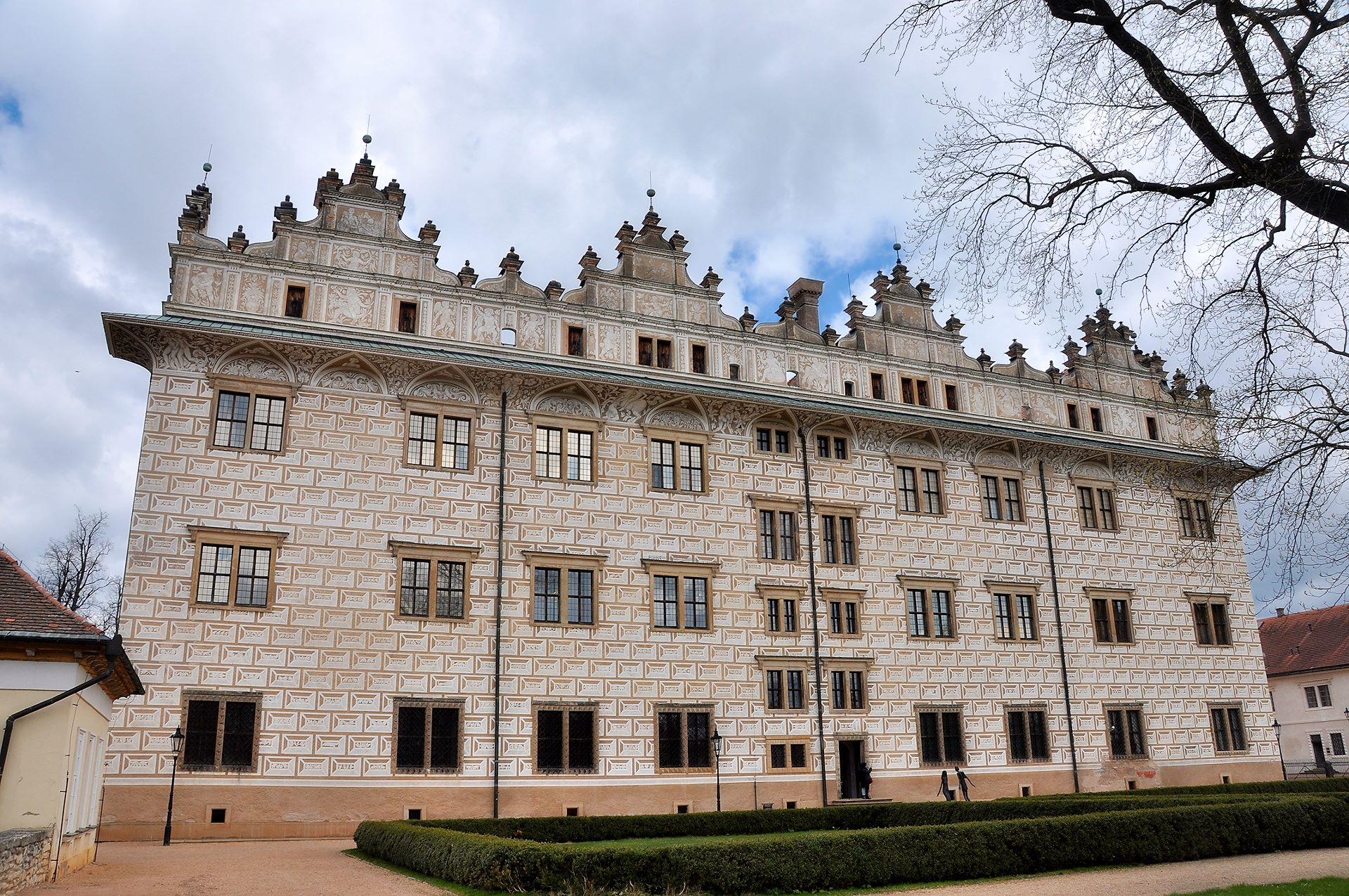 Litomysl